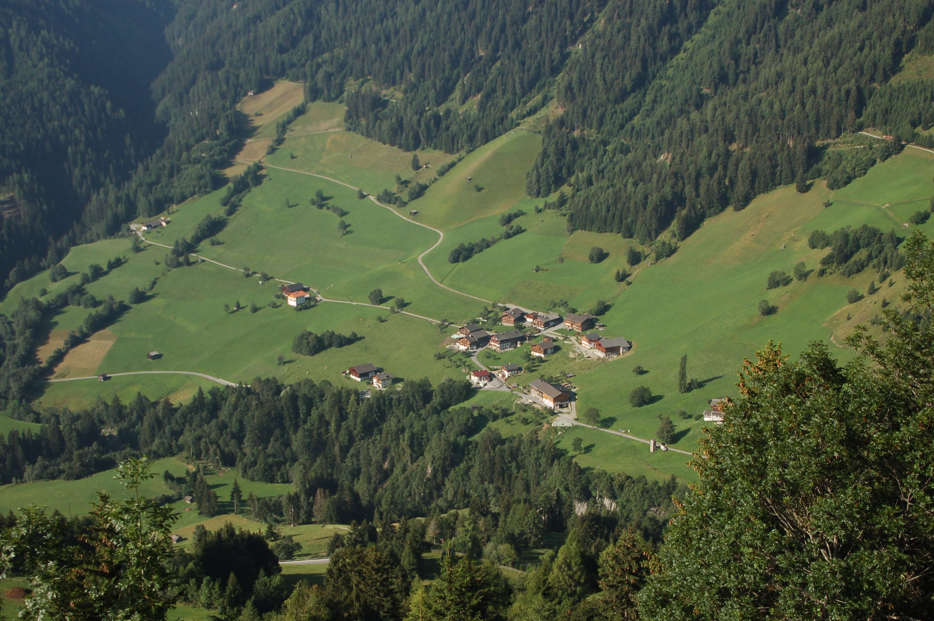 Das ZEntrum der Fraktion Welzelach (Gemeinde Virgen), gesehen von Osten vom Hof Budam